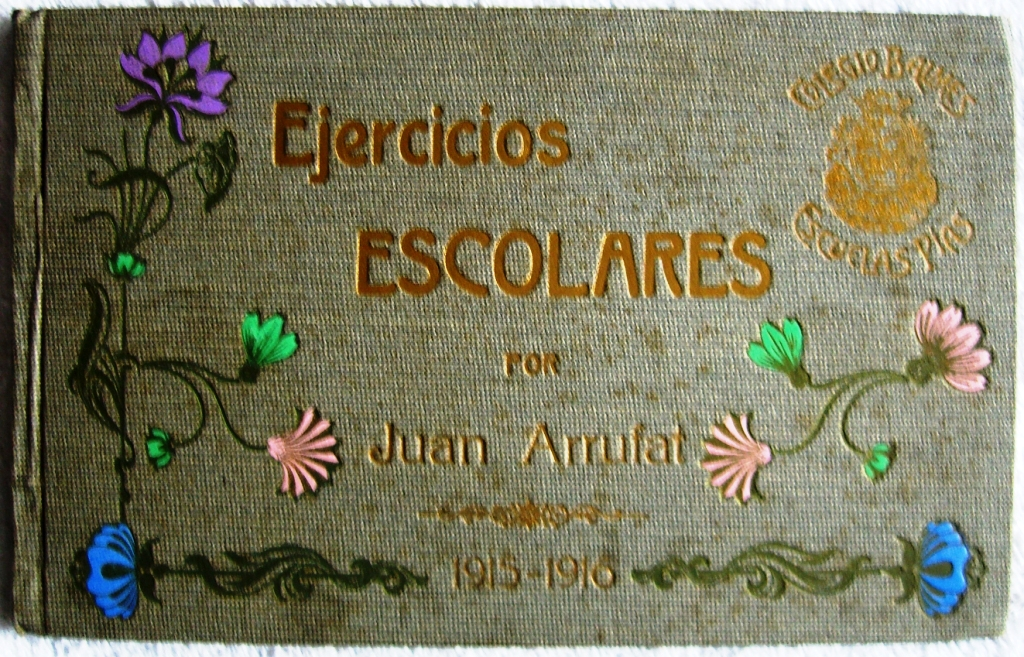 Ejercicios escolares del Colegio Balmes